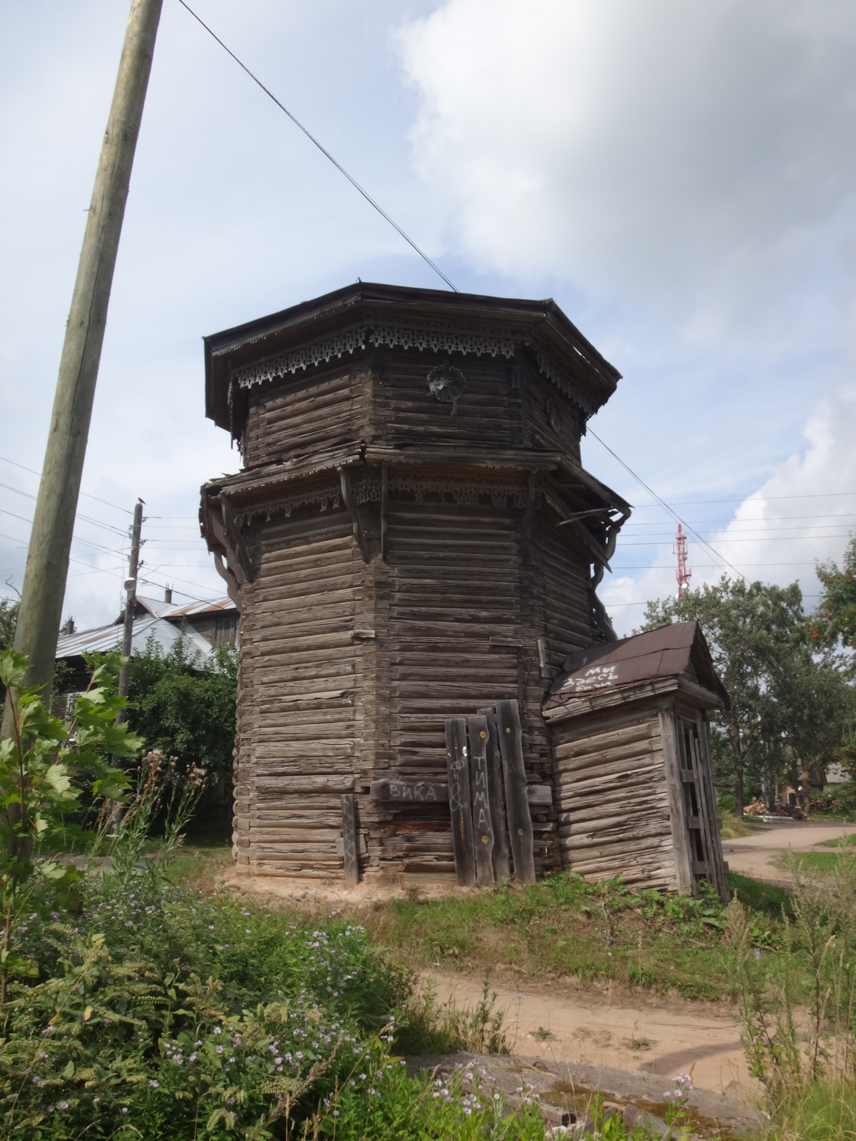 Водонапорная башня в Устюжне